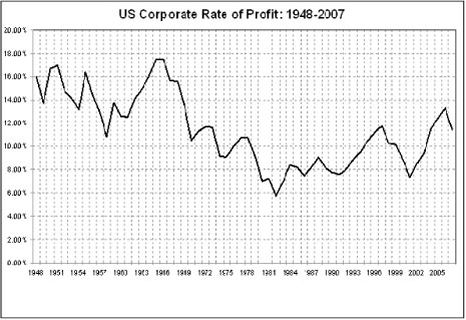 Прибыль американских корпораций 1948-2007